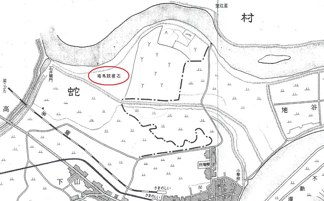 昭和8年発行の著作権保護期間満了済の地図にコントラスト等を加えました。石巻の地図です。